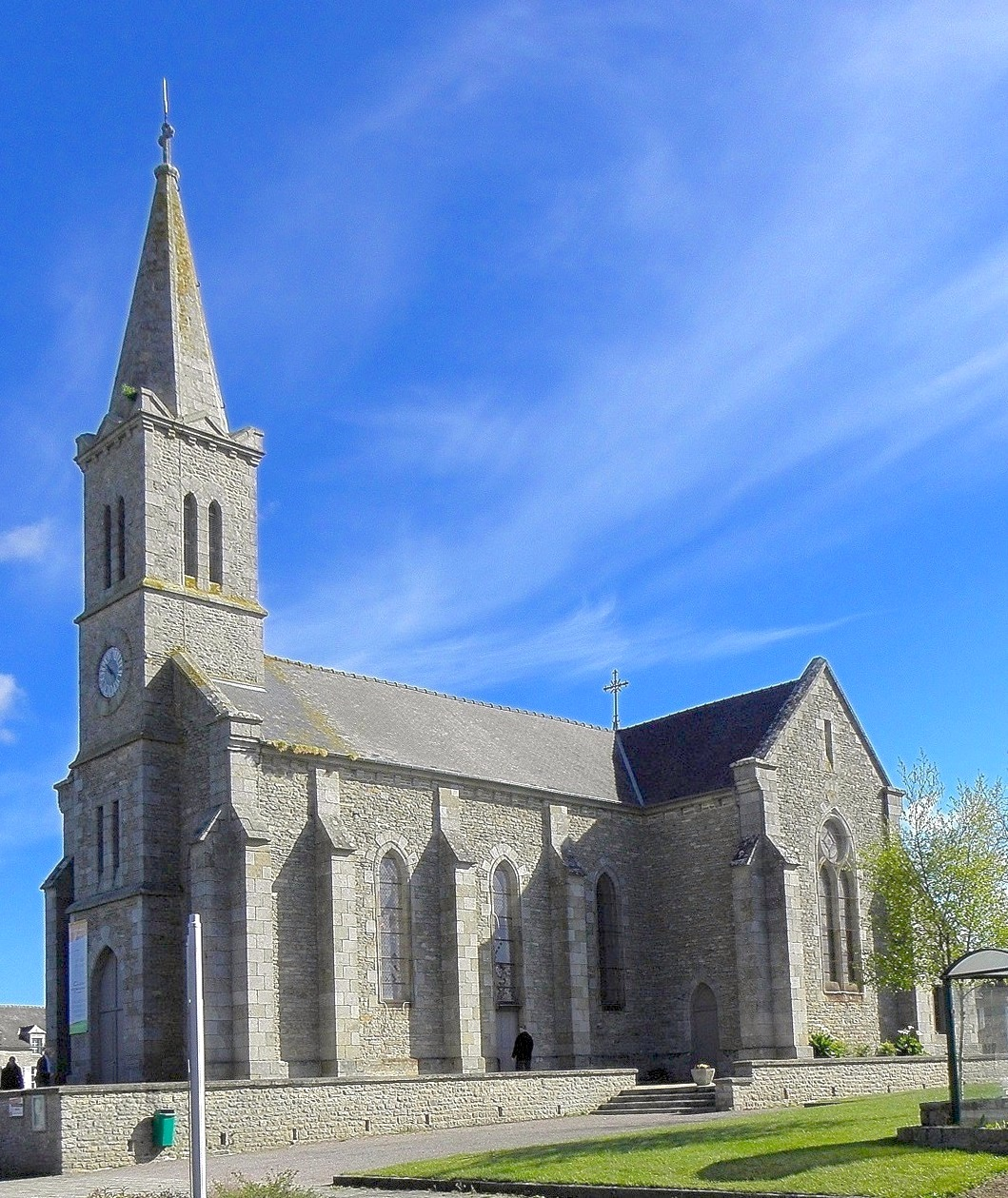 Église Saint-Malo de Brusvily (22).